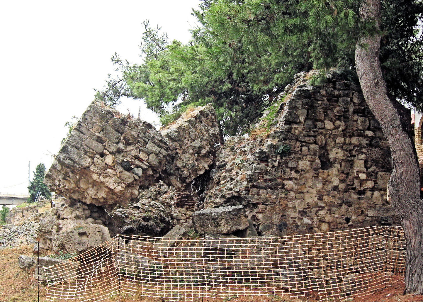 Stadtmauer des antiken Potidea